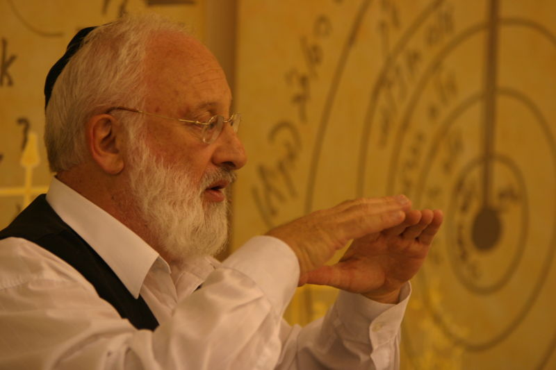 הרב לייטמן מעביר הרצאה בית קבלה לעם,ארכיון תנועת בני ברוך הננו מאשרים לאריאל צור להשתמש בתמונה של הרב לייטמן מרצה בבית קבלה לעם לצורך הערך "מיכאל לייטמן"